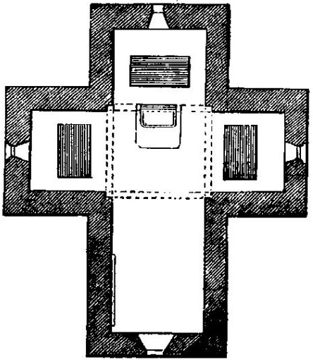 Mausoleum of Galla Placidia. Plan.